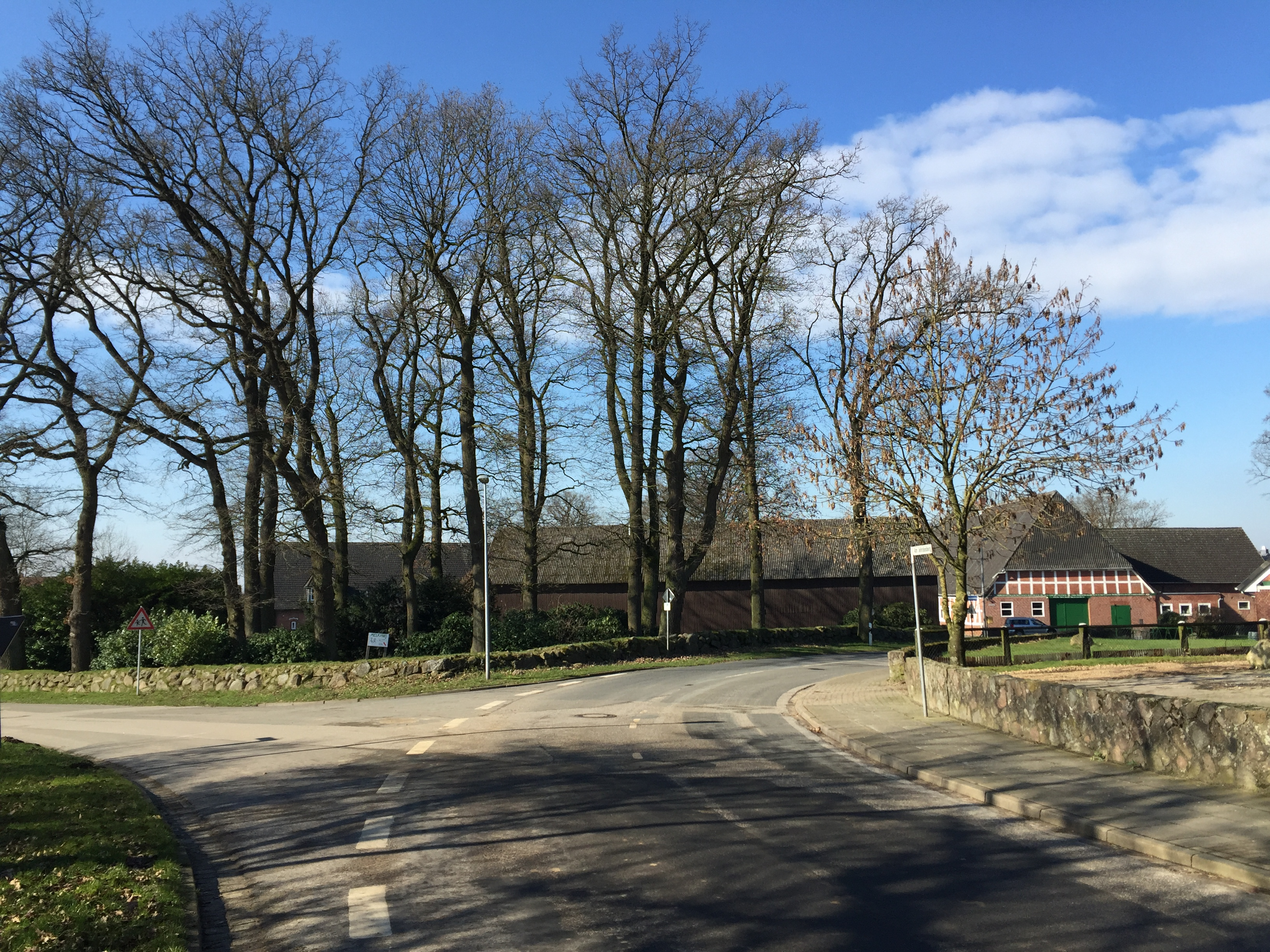 Zentrum von Ardestorf